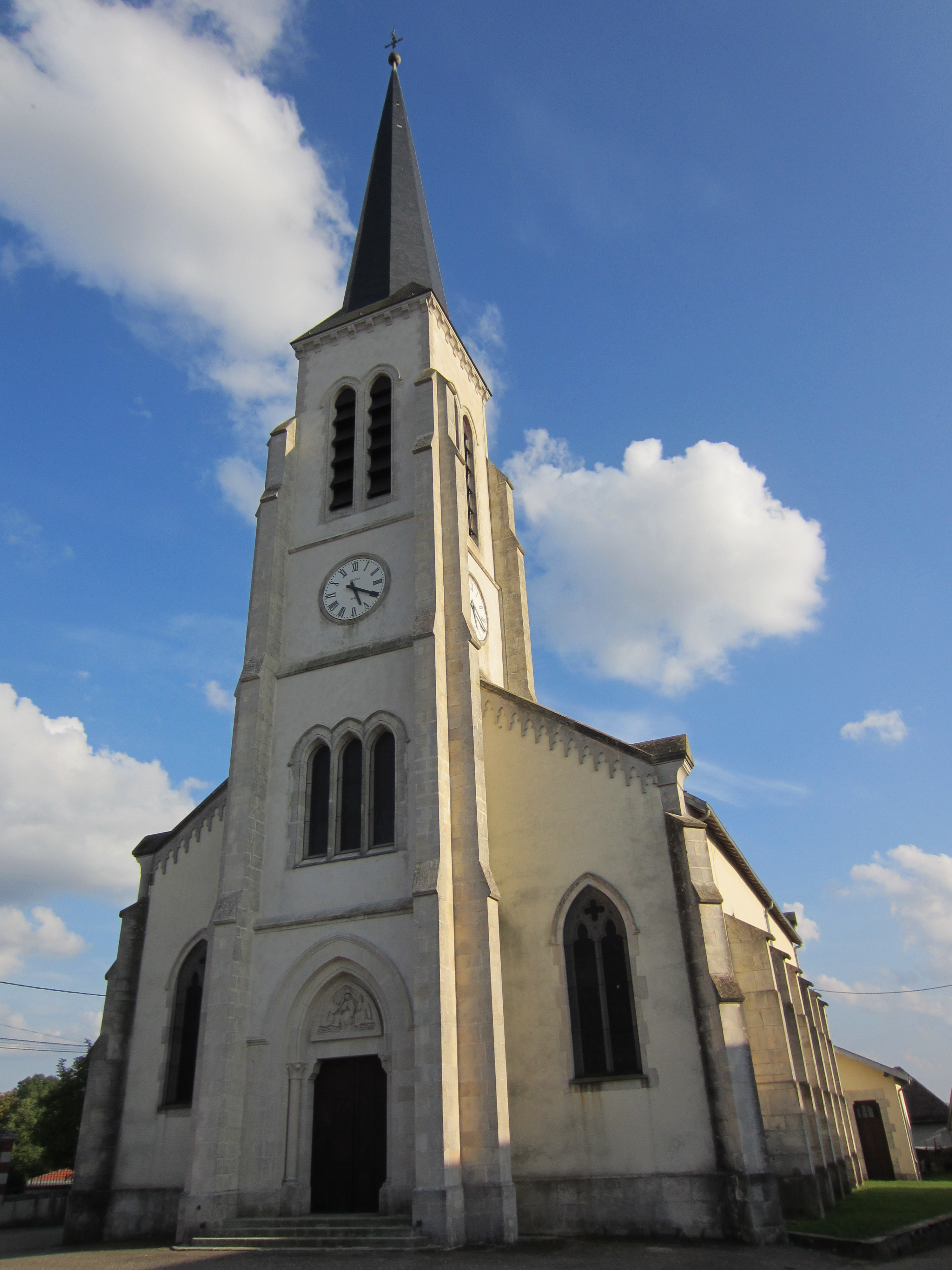 Description eglise Limey eglise Limey